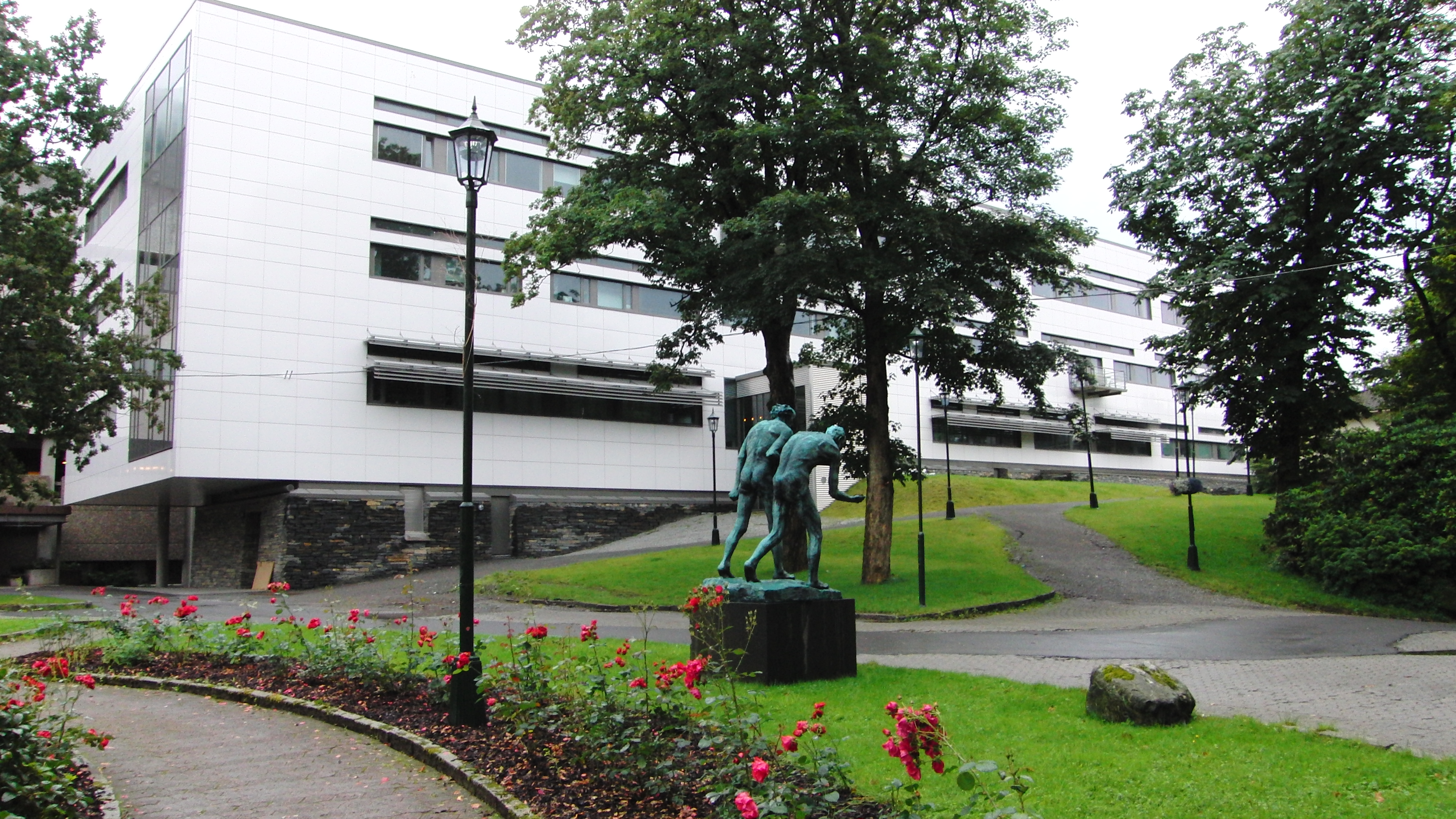 Description=Haukeland Universitetssykehus